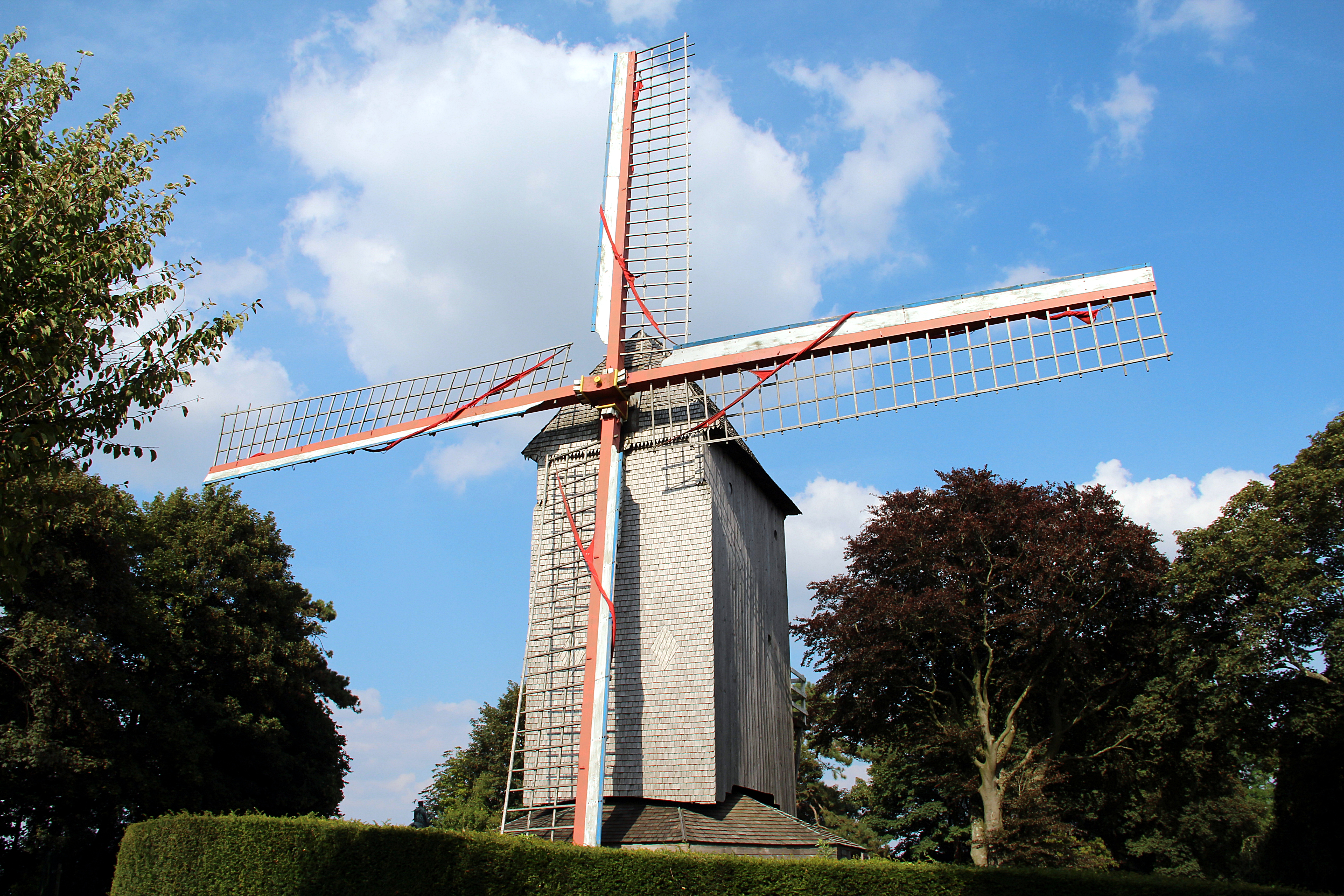 Moulin de l'étendart de Cassel (Nord, France).